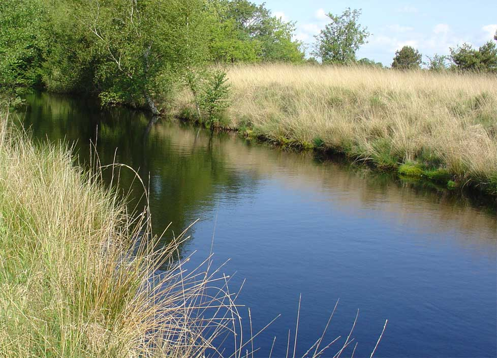 De Lycklamavaart nabij het Fochtloërveen, hoogveengebied op de grens van Groningen en Friesland